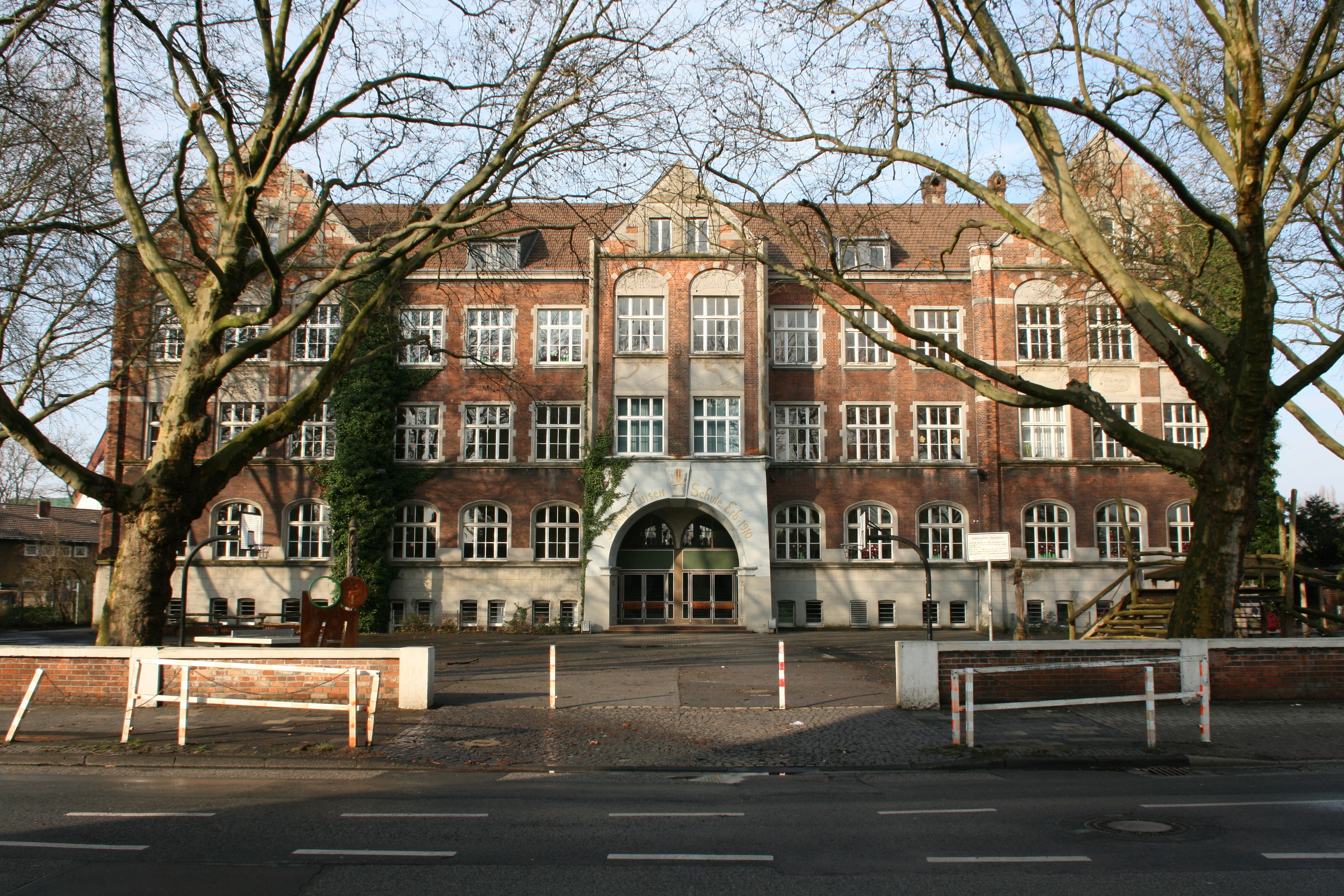 Königin-Luisen-Schule (Städt. Gemeinschaftshauptschule), Wilhelmstraße 88 in Herne